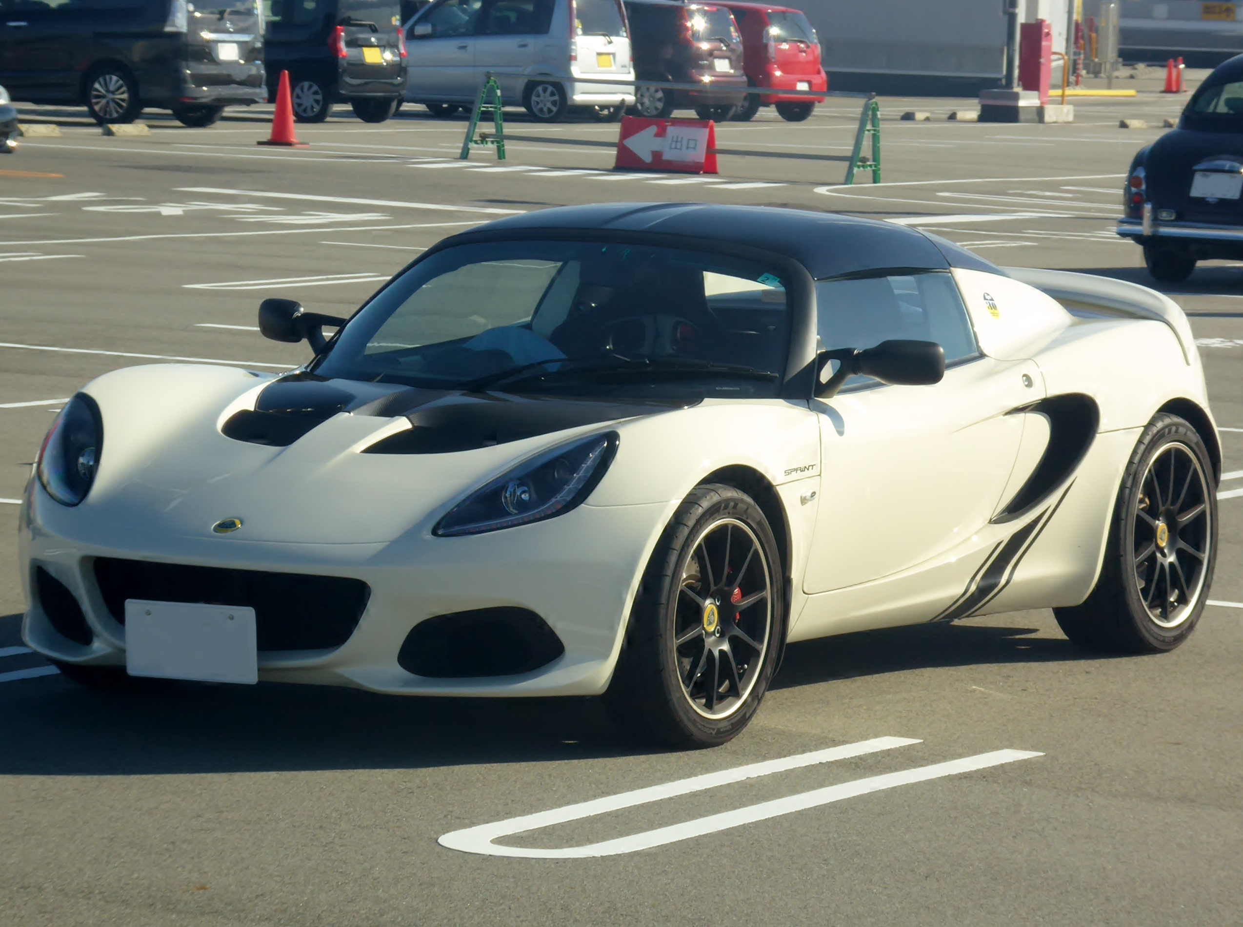 ロータス・エリーゼフェイズ3スプリント220をフロントから撮影。